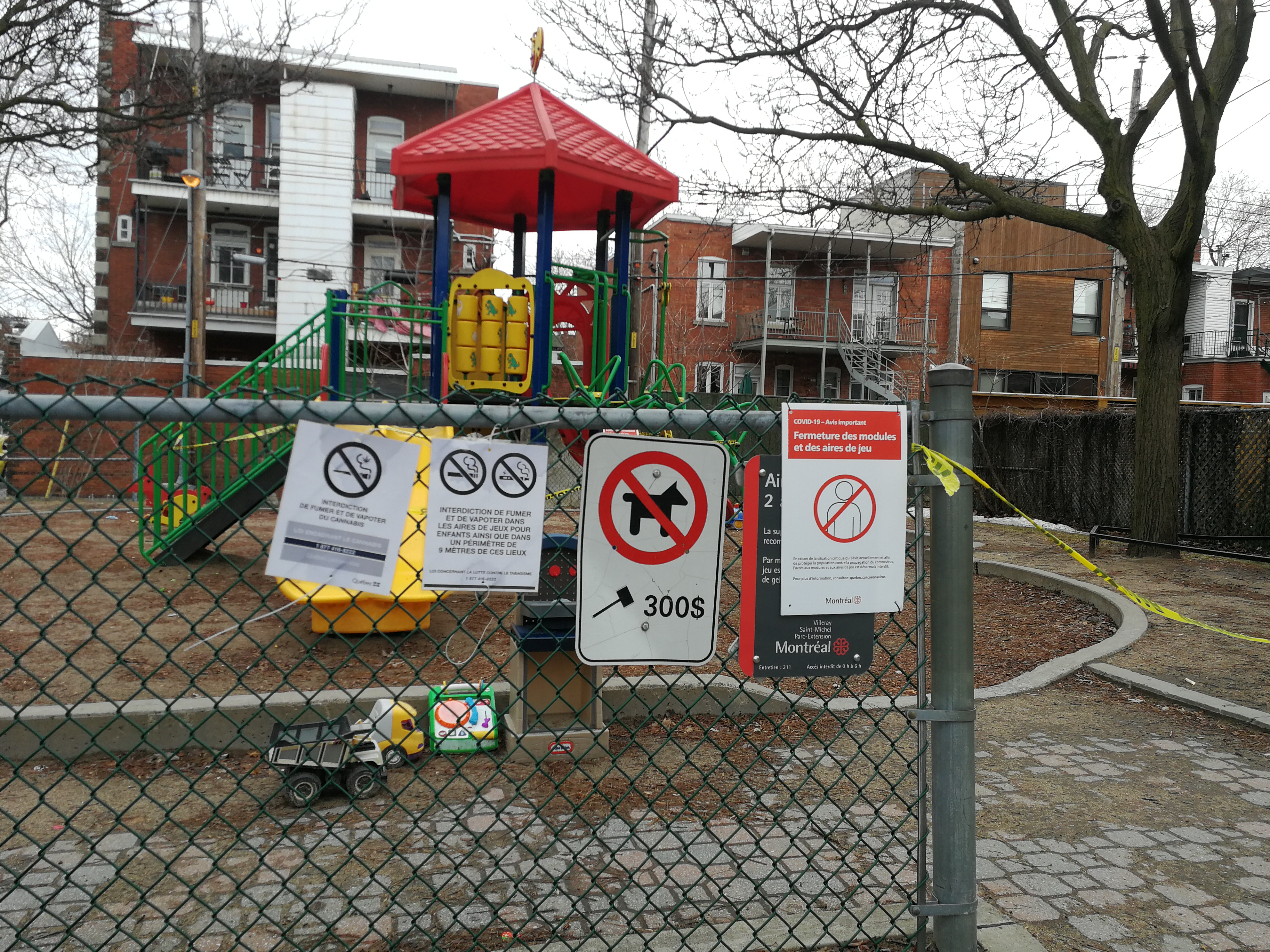 Le 22 mars, la ville de Montréal ferme les modules et aires de jeu pour enfants dans ses parcs. Voici un exemple, où l'on voit l'affiche indiquant la fermeture sur la clôture.